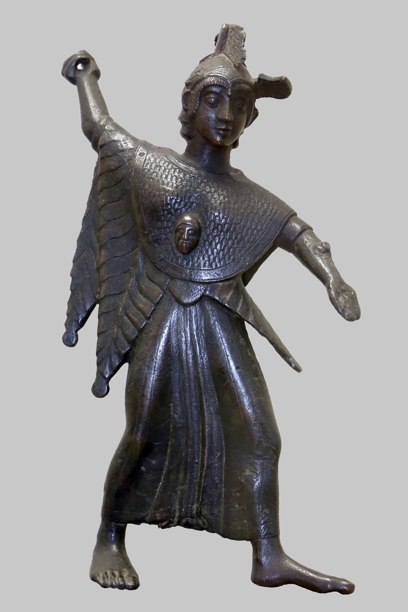 Palazzo_dei_musei_(Modena) This is a photo of a monument which is part of cultural heritage of Italy.